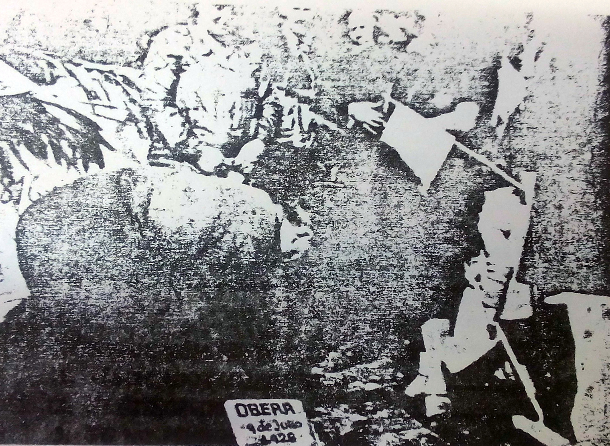 Daguerrotipo del momento en que el acta fundacional es colocada en su lugar de destino (actual Plaza San Martín) en la ciudad de Oberá un 9 de julio de 1928.